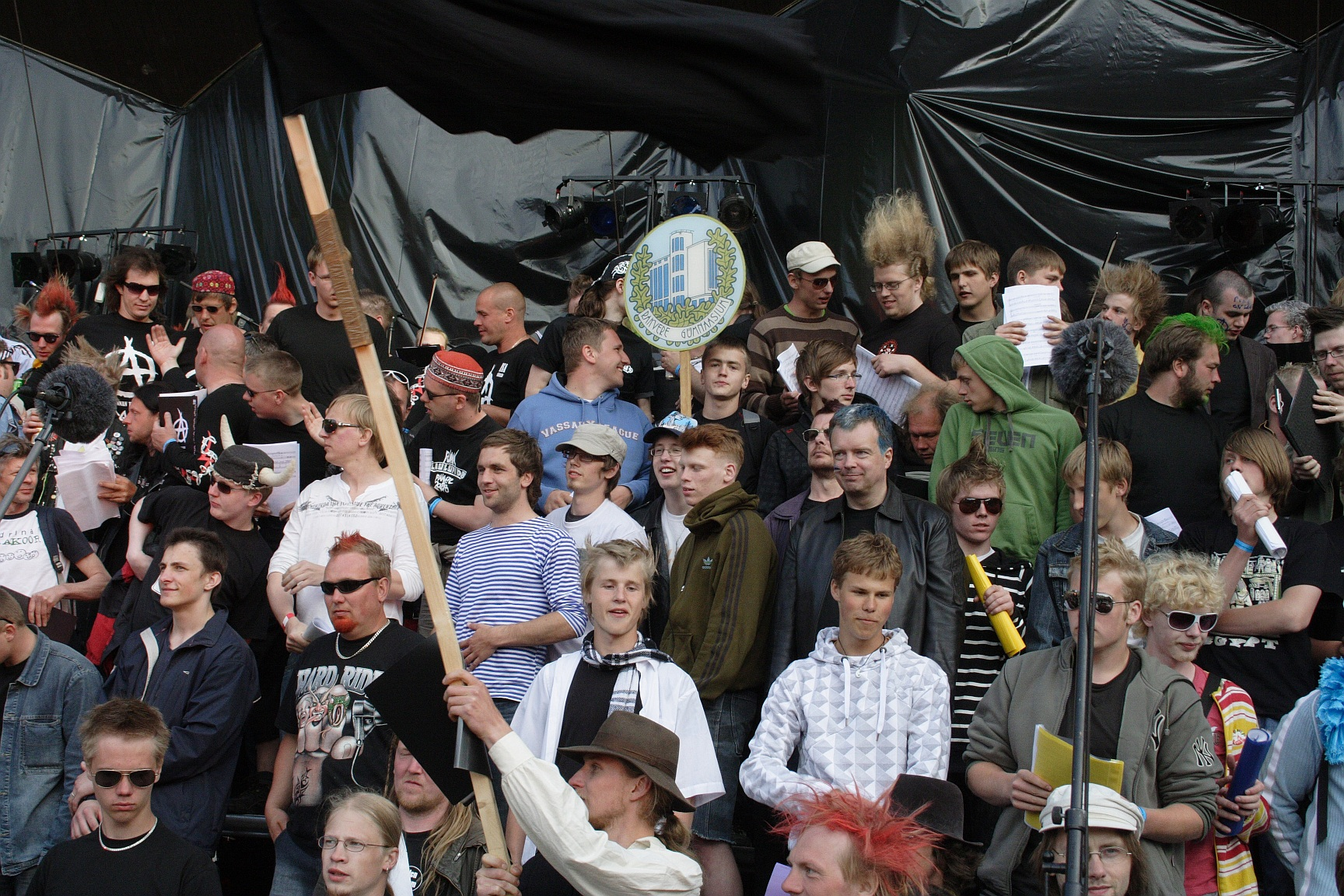 Punklaulupidu Rakvere 2008, koor